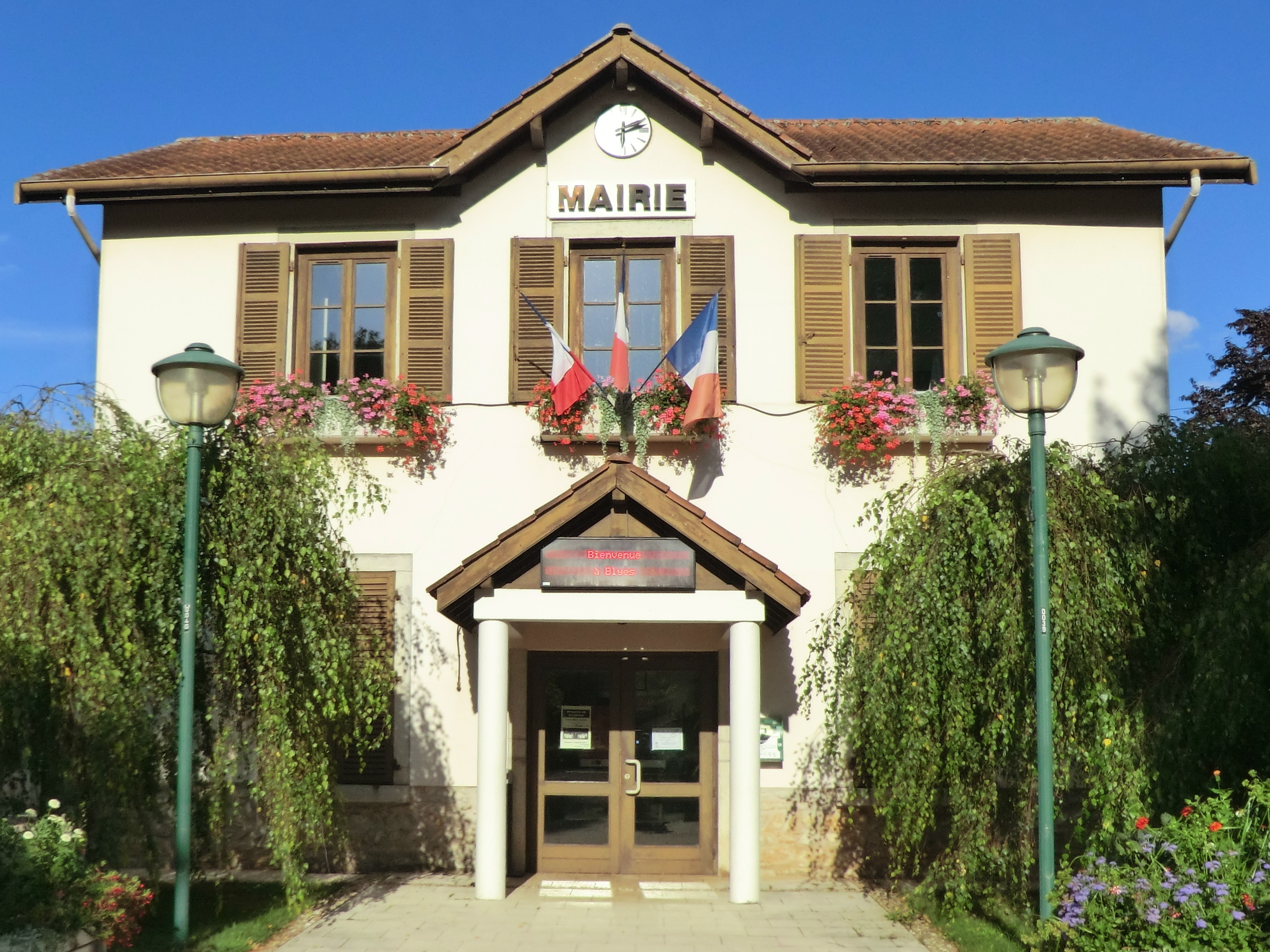 Mairie de Blyes.